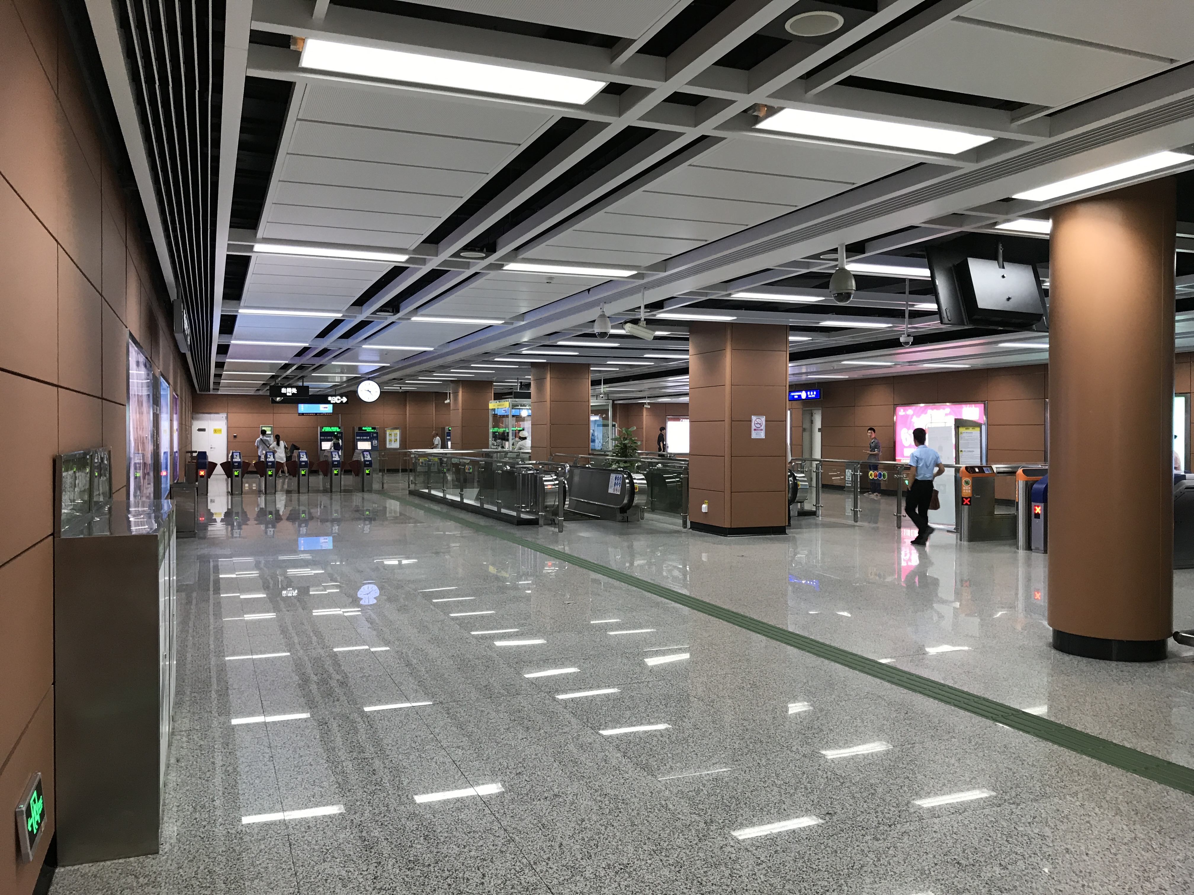 广佛地铁鹤洞站